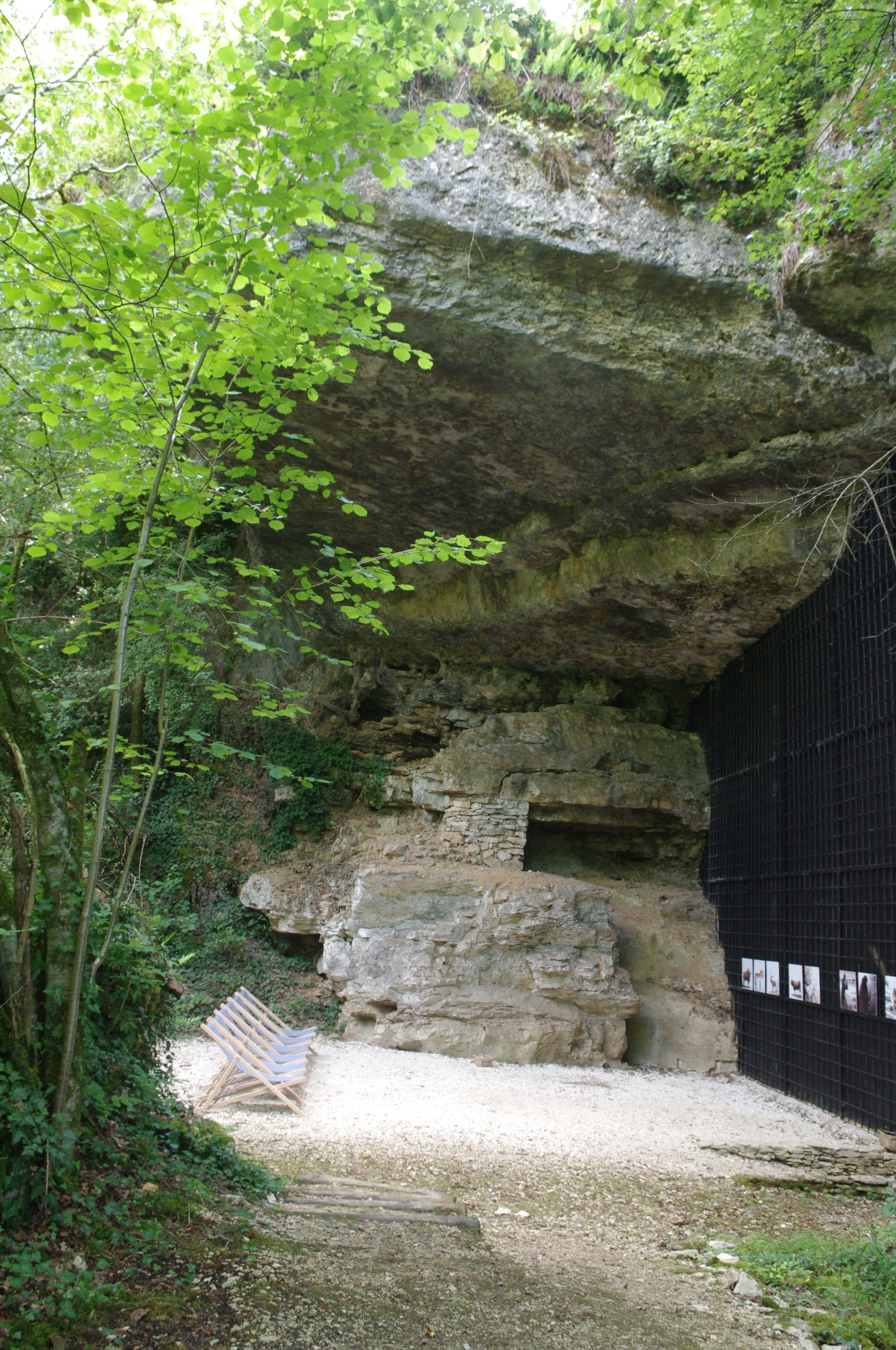 L'entrée de la Grotte du Placard, Vilhonneur, Charente, France .